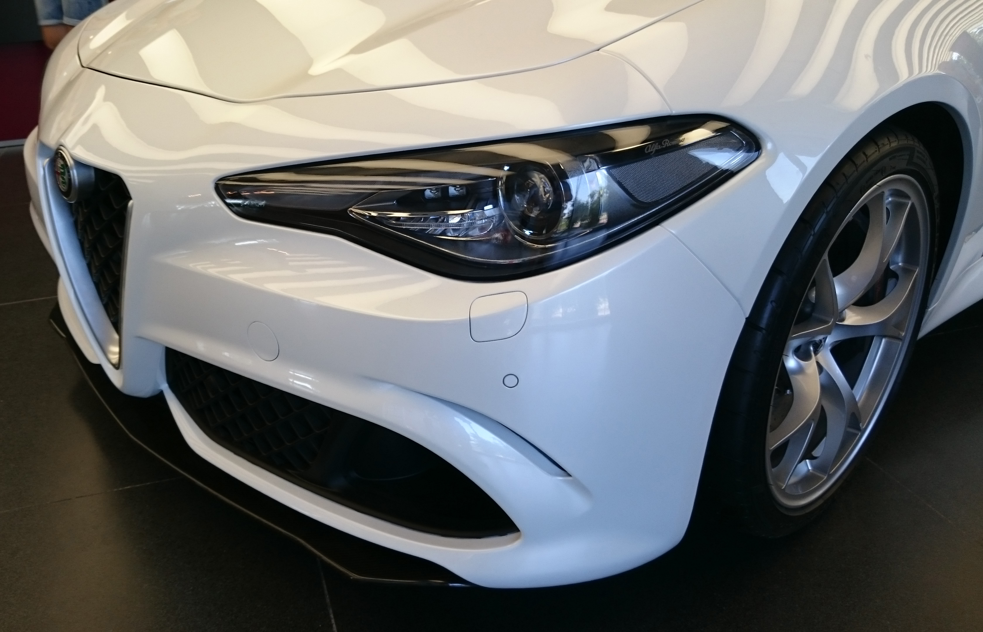 Un modello pre-serie (fatto a mano) della Alfa Romeo Giulia 2015 esposto in anteprima mondiale al rinnovato Museo Alfa Romeo di Arese in occasione dei 105 anni del marchio